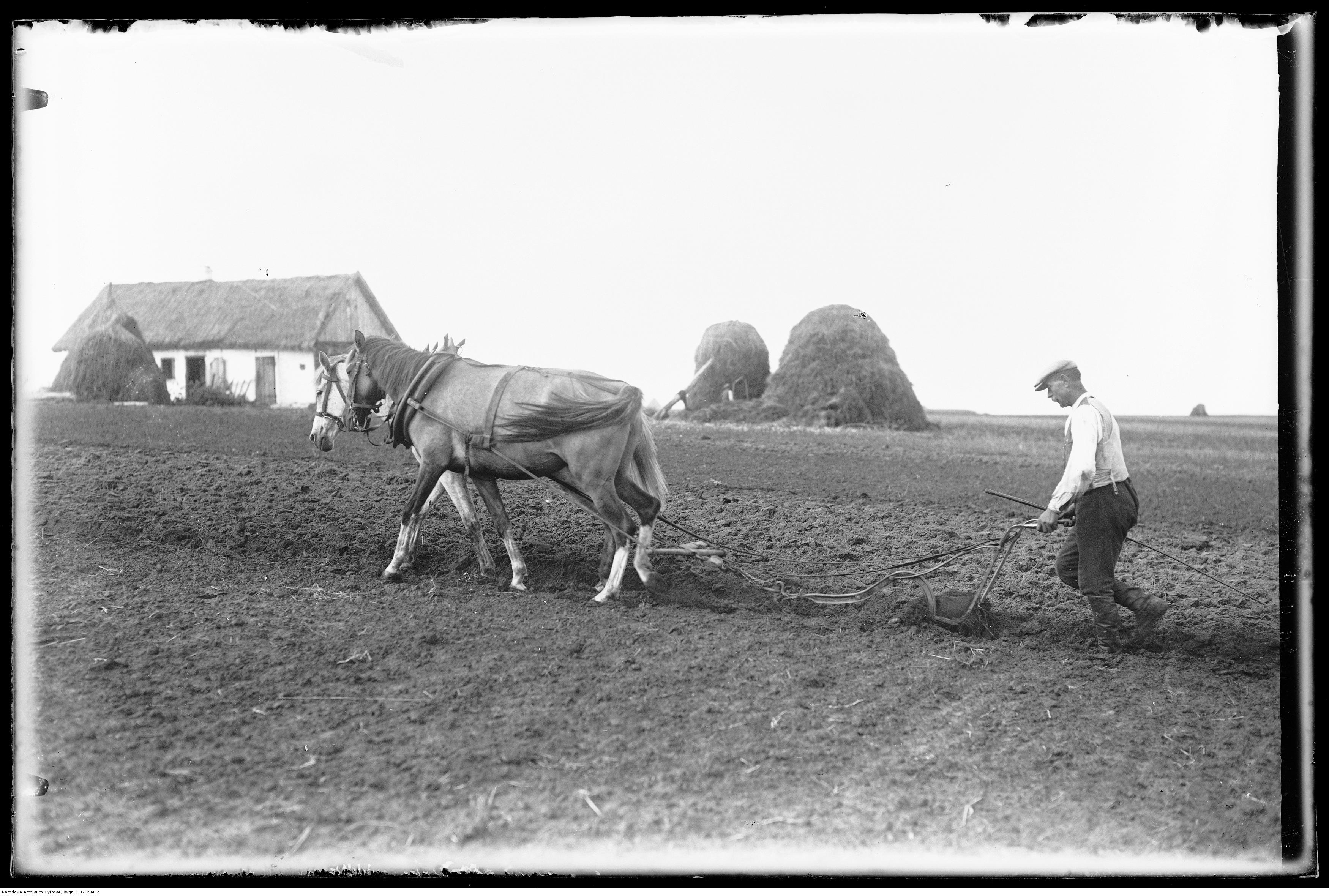 Orka w gospodarstwie starszego wachmistrza Franciszka Głaszczki. W oddali dom i stogi słomy.